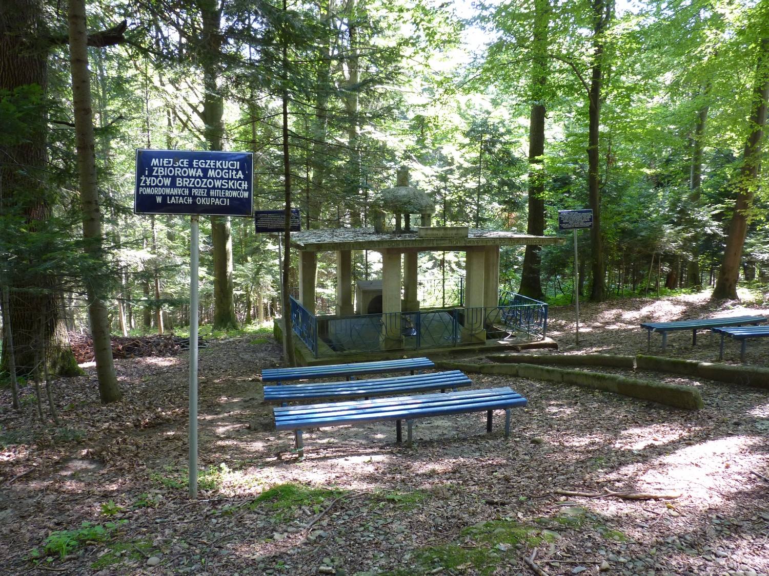 Brzozów – Pomnik i mogiła zbiorowa Żydów zamordowanych przez Niemców w czasie II Wojny Światowej.